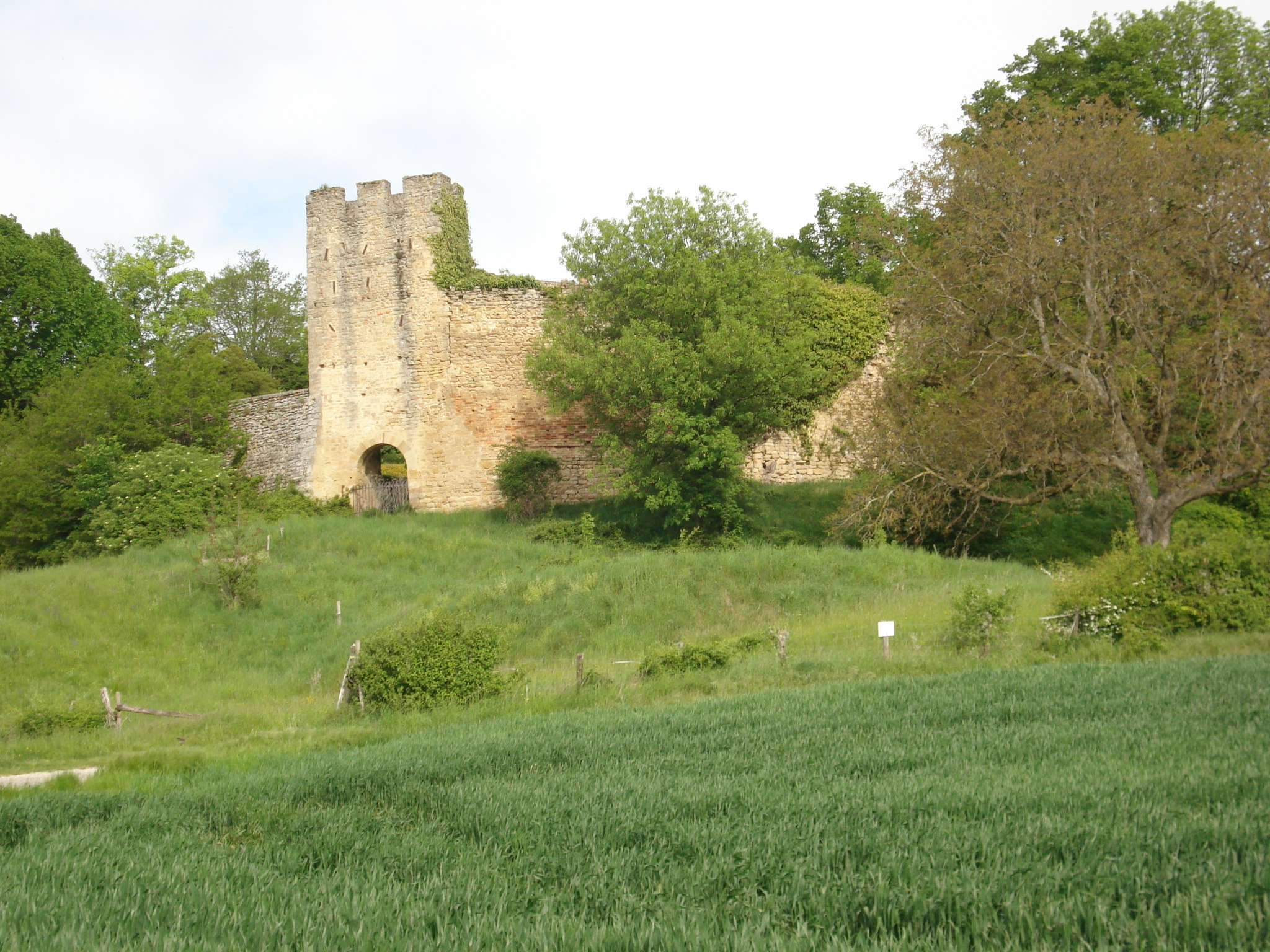 château de Montchenu (XVe, XVIe siècle) dans la Drôme